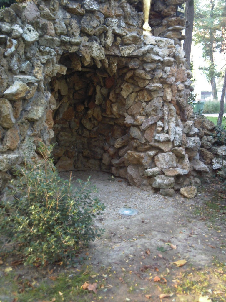 Drancy - Parc de Ladoucette, la glacière